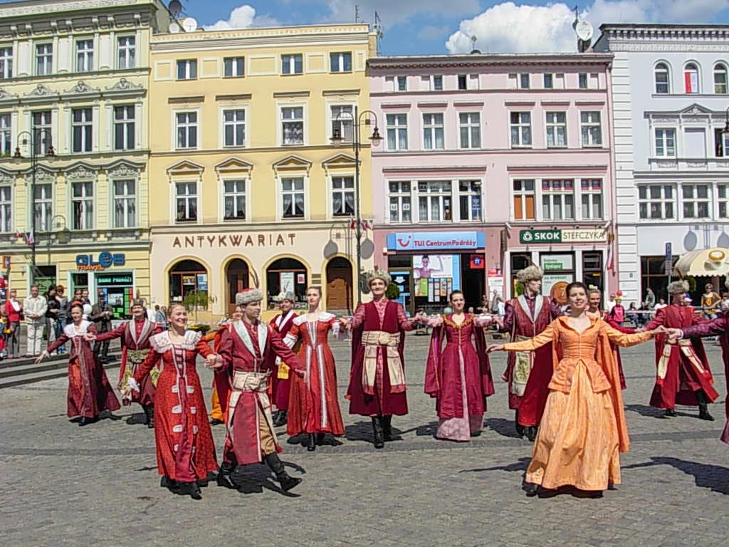 Uroczystości 3 Maja na Starym Rynku w Bydgoszczy - taniec zespołu "Ziemia Bydgoska"